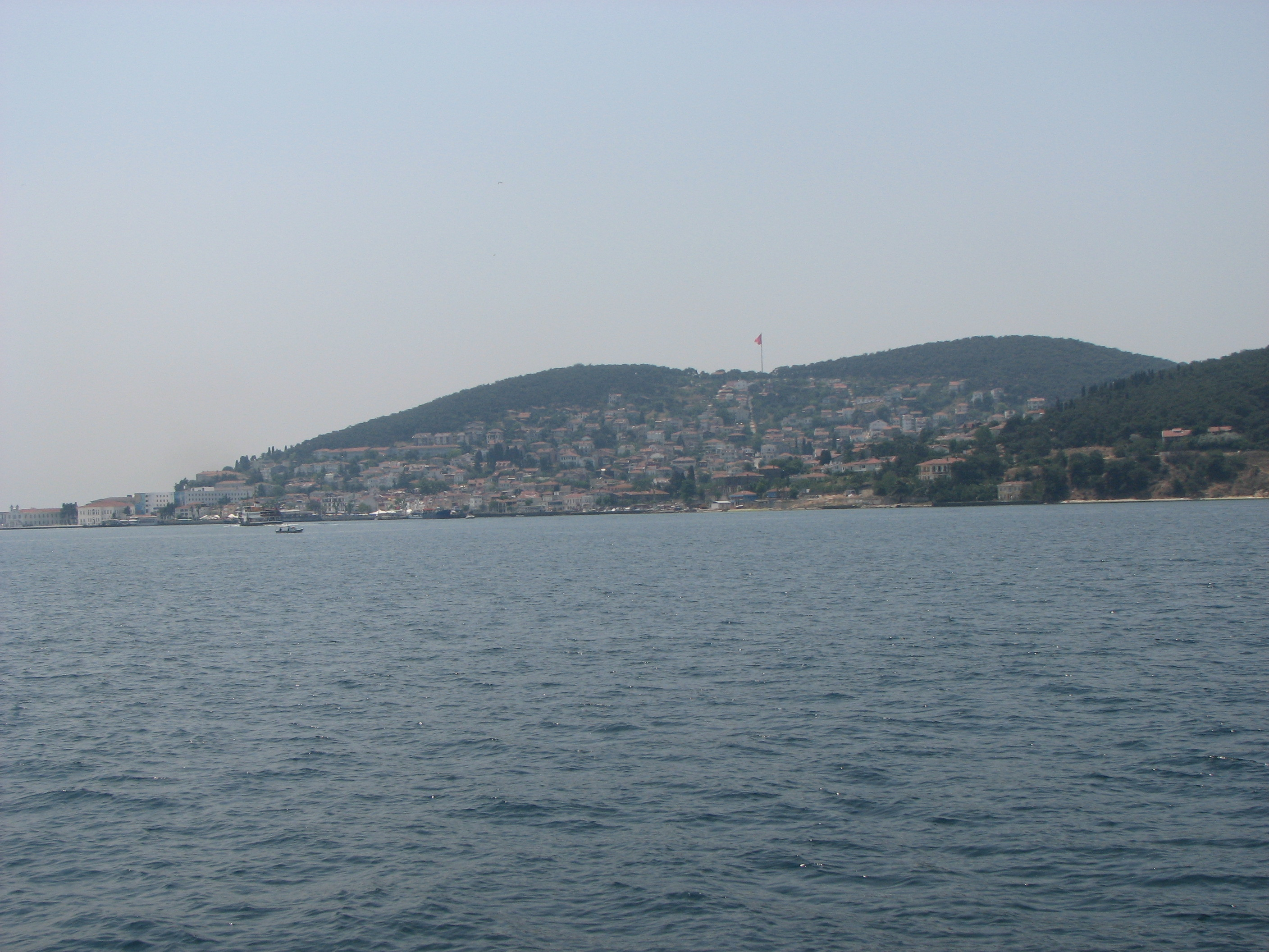 Heybeliada island, Turkey